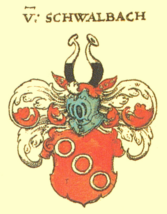 Wappen der Rheinländischen Adelsfamilie Schwalbach